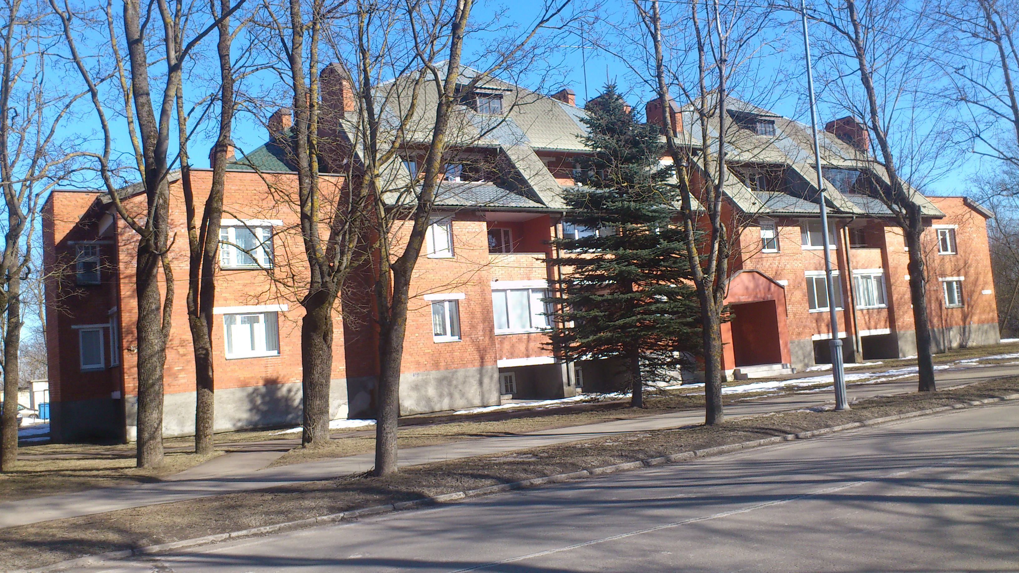 Elumaja Hariduse 16, Narva